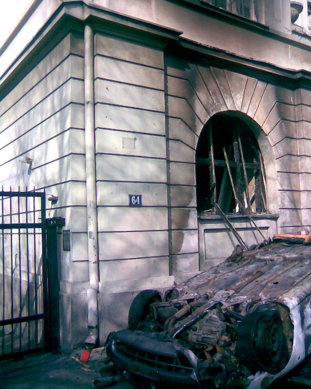 Croatia Ambassy, Knesa Milosa, Belgrade/Devant l'ambassade de Croatie, Kneza Milosa à Belgrade